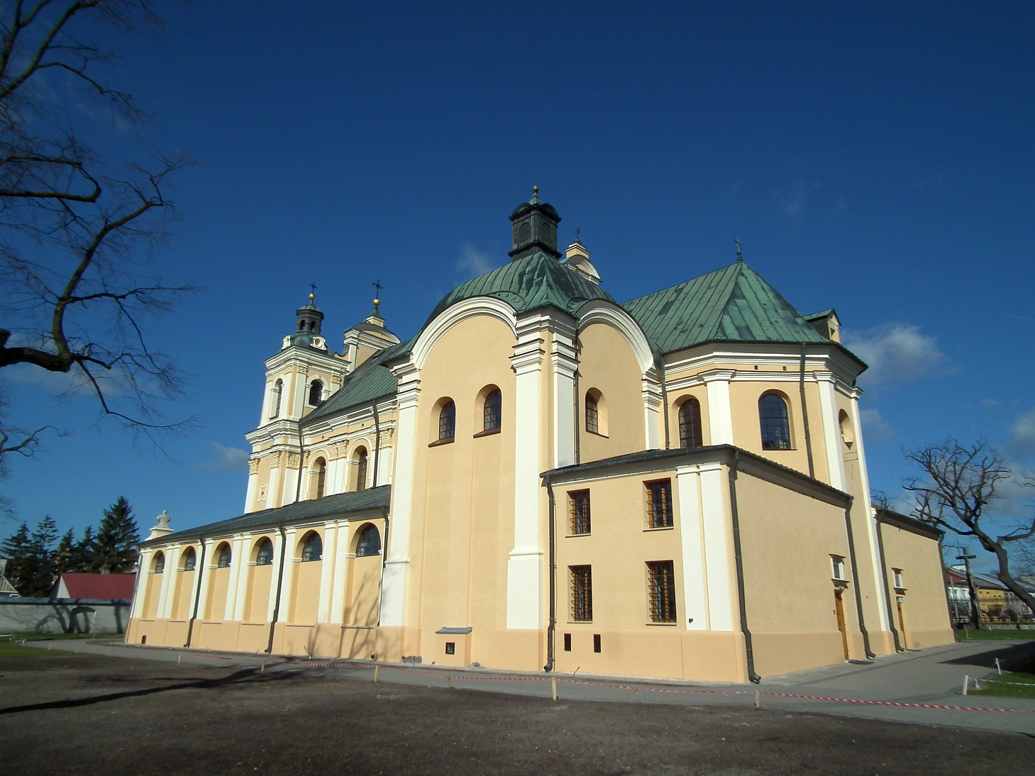 Opole Lubelskie, kościół, ob. p.w. Wniebowzięcia NMP, XVII, XIX